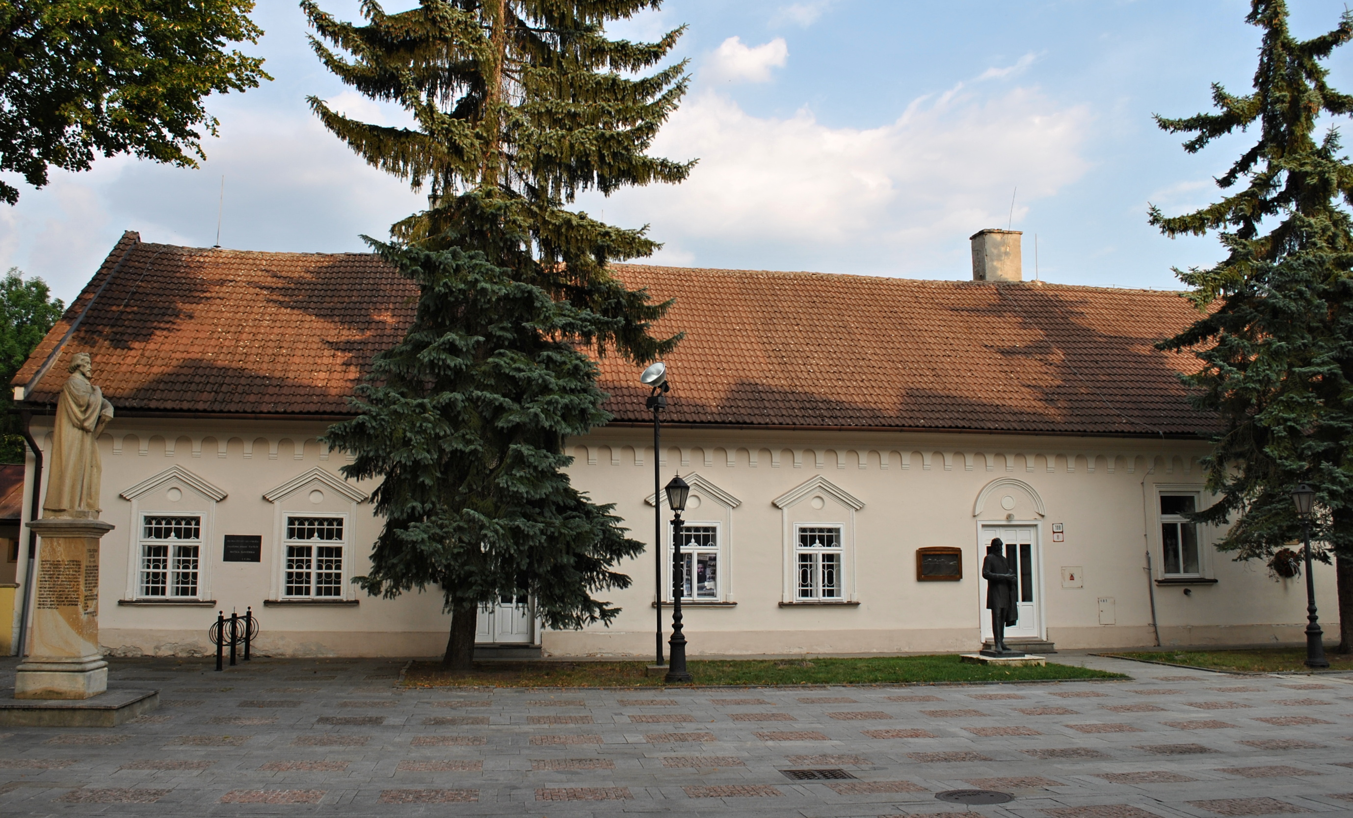 Liptovský Mikuláš - budova evanjelickej fary